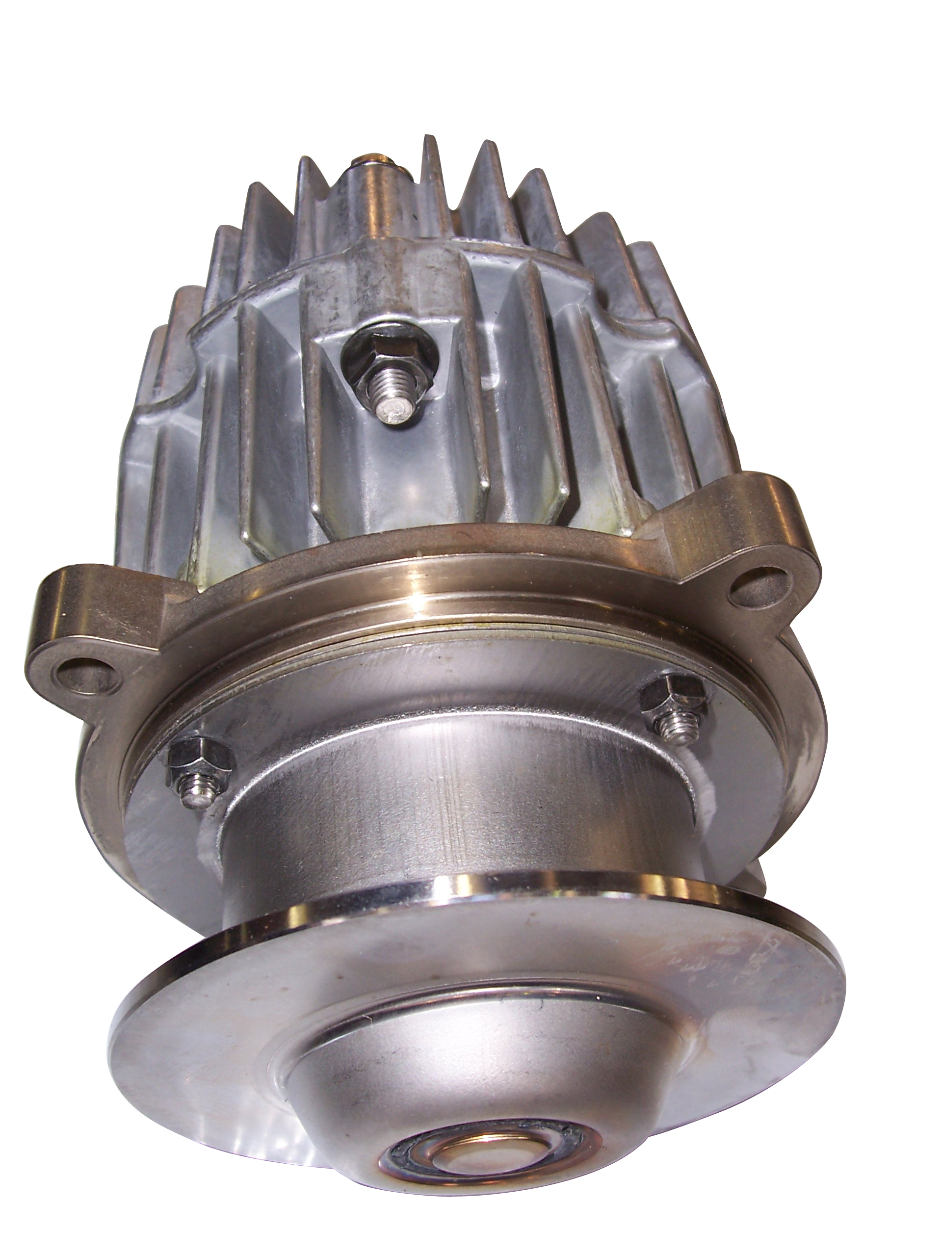 Variable exhaust brake air cylinder